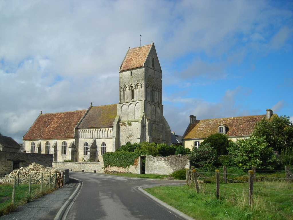 Entrée du village de Noron-L'Abbaye, (Calvados, France).